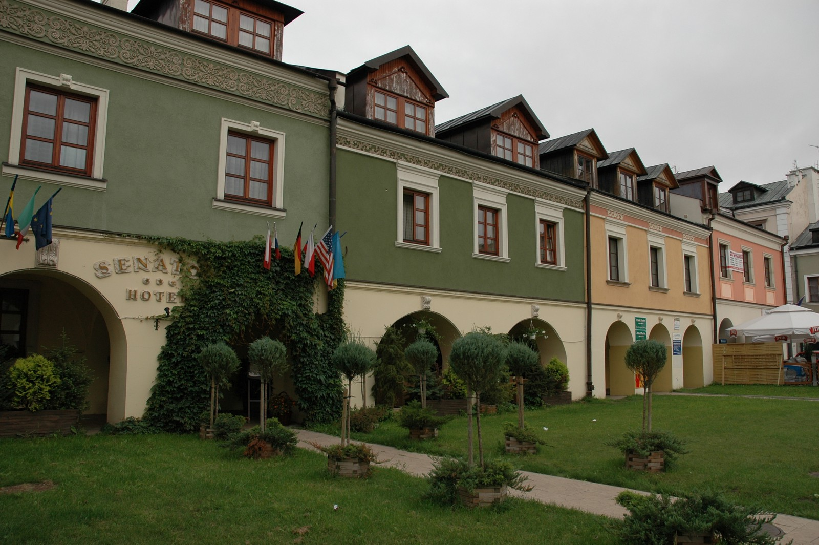 Kamienice we wschodniej pierzei Rynku Solnego w Zamościu